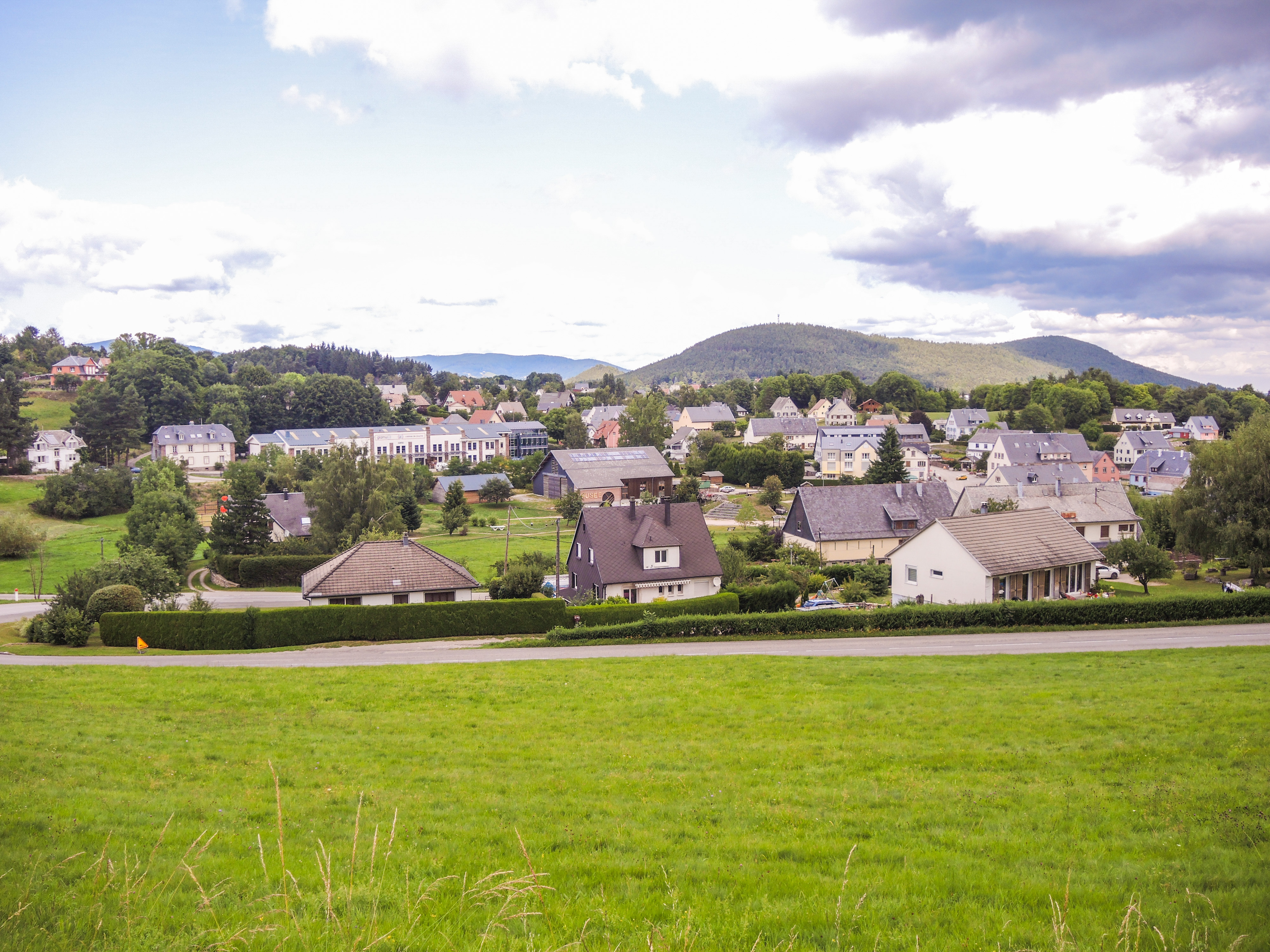 Labaroche, vu de la route d'Orbey. Haut-Rhin